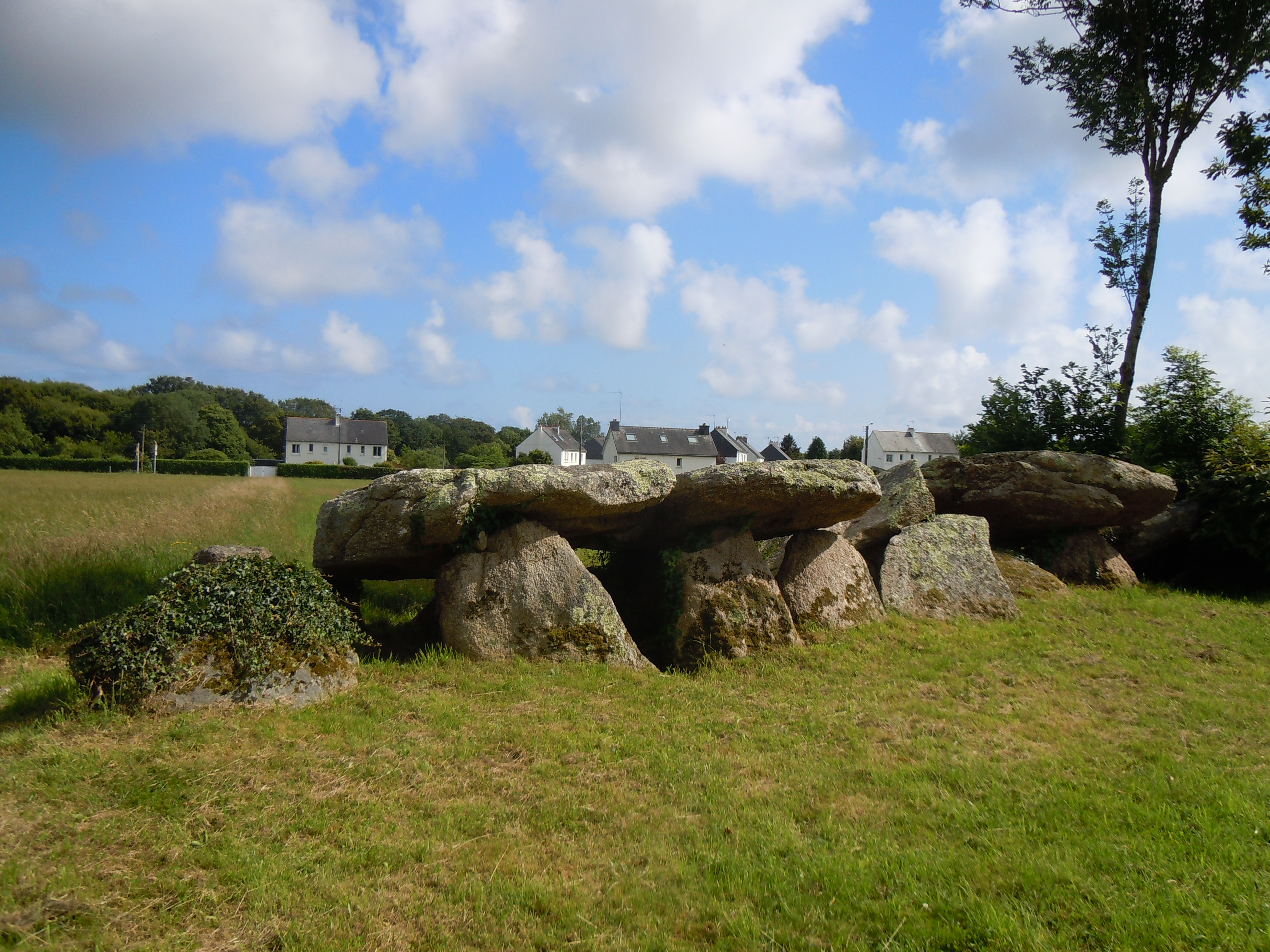 allée couverte de Kergoustance sur la commune de Moëlan-sur-Mer dans le département du Finistère.